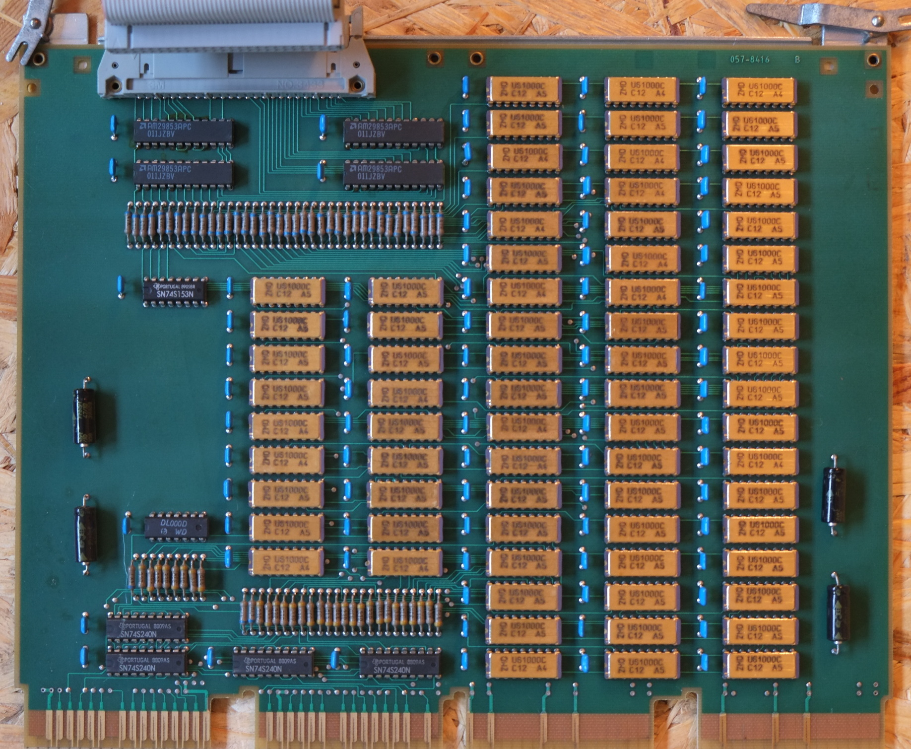 Speicher einer K1822 (RAM)